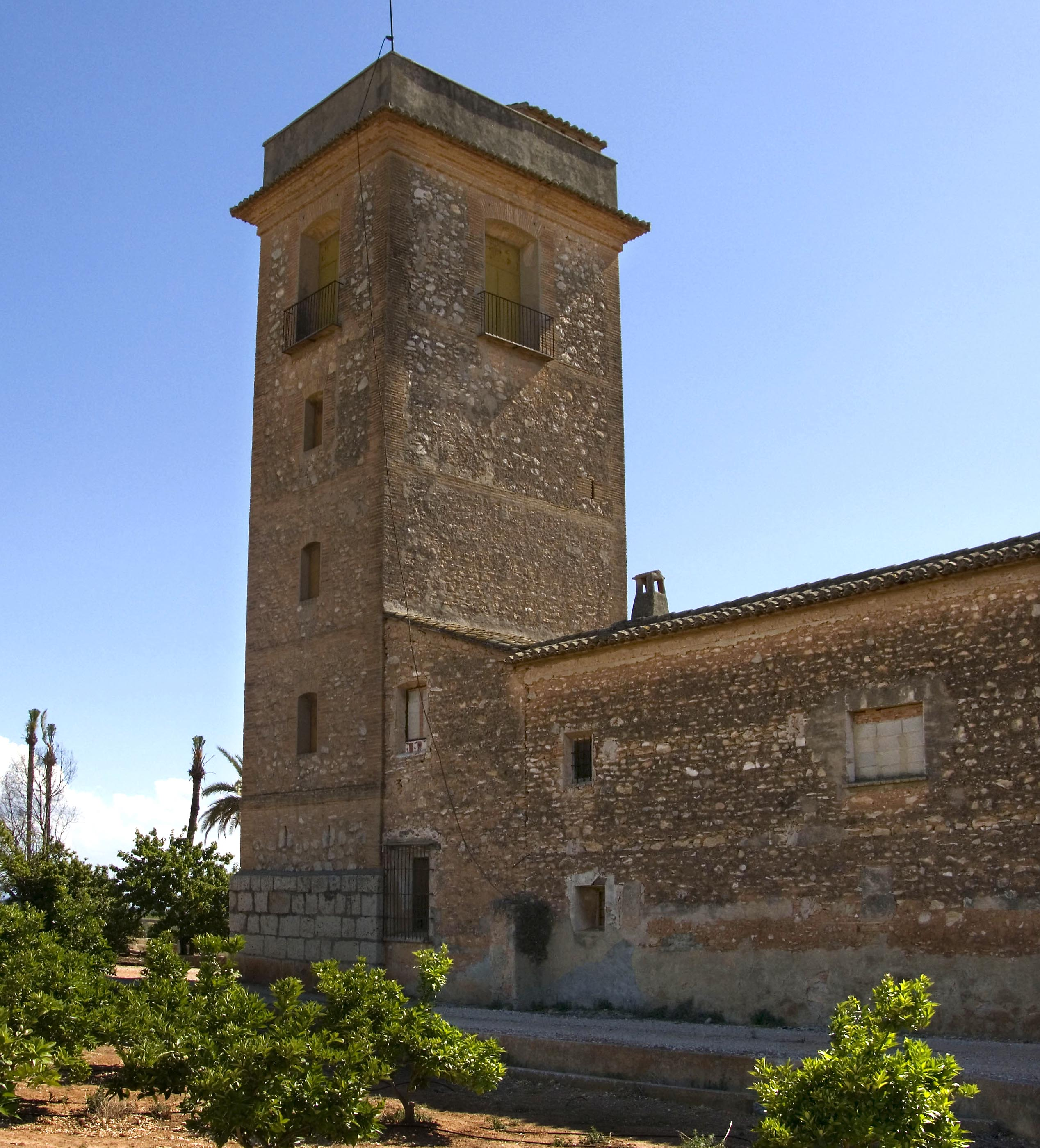 Torre defensiva d'una antiga vila medieval islàmica.